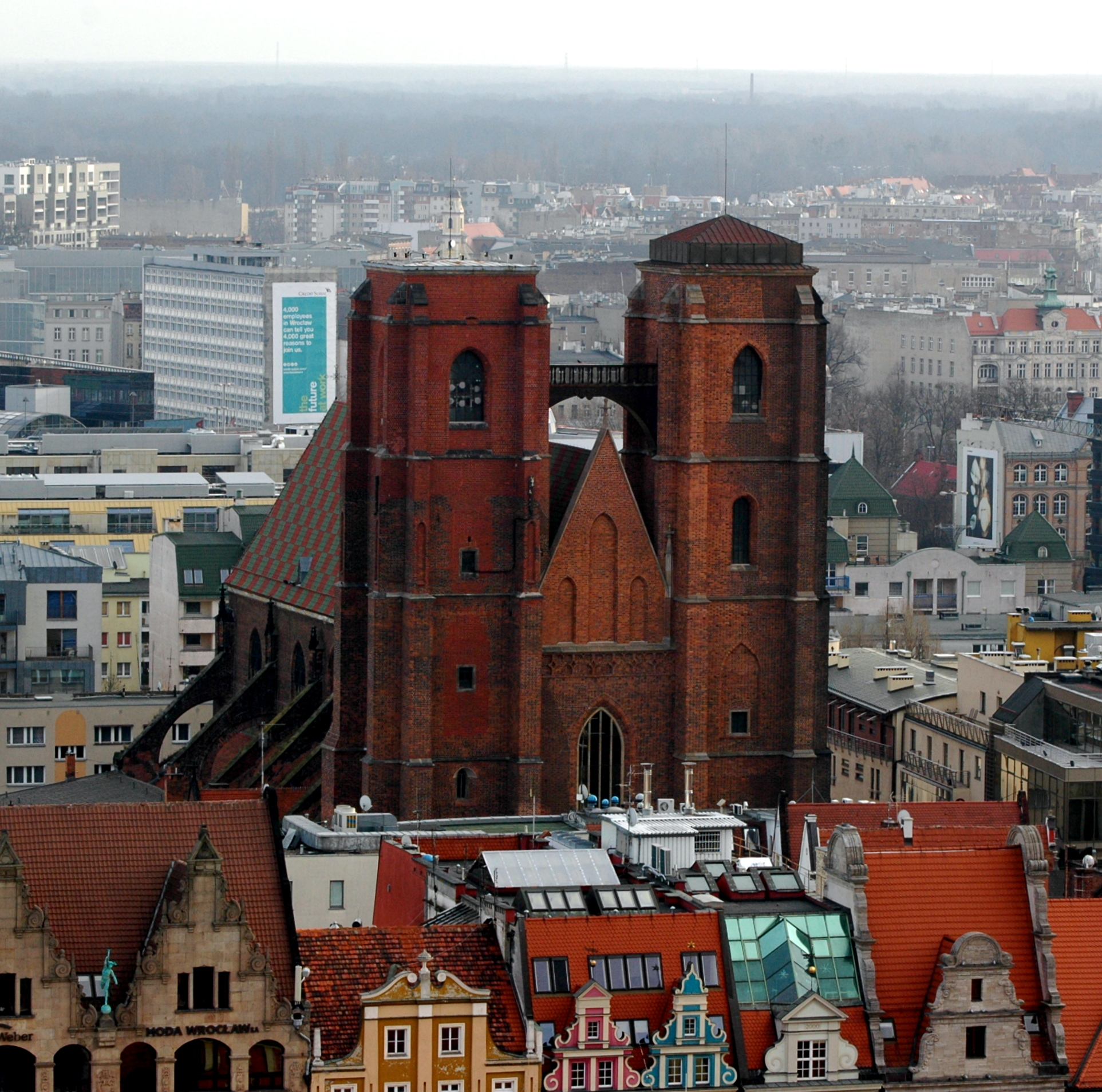 Katedra św. Marii Magdaleny we Wrocławiu w 2015 roku